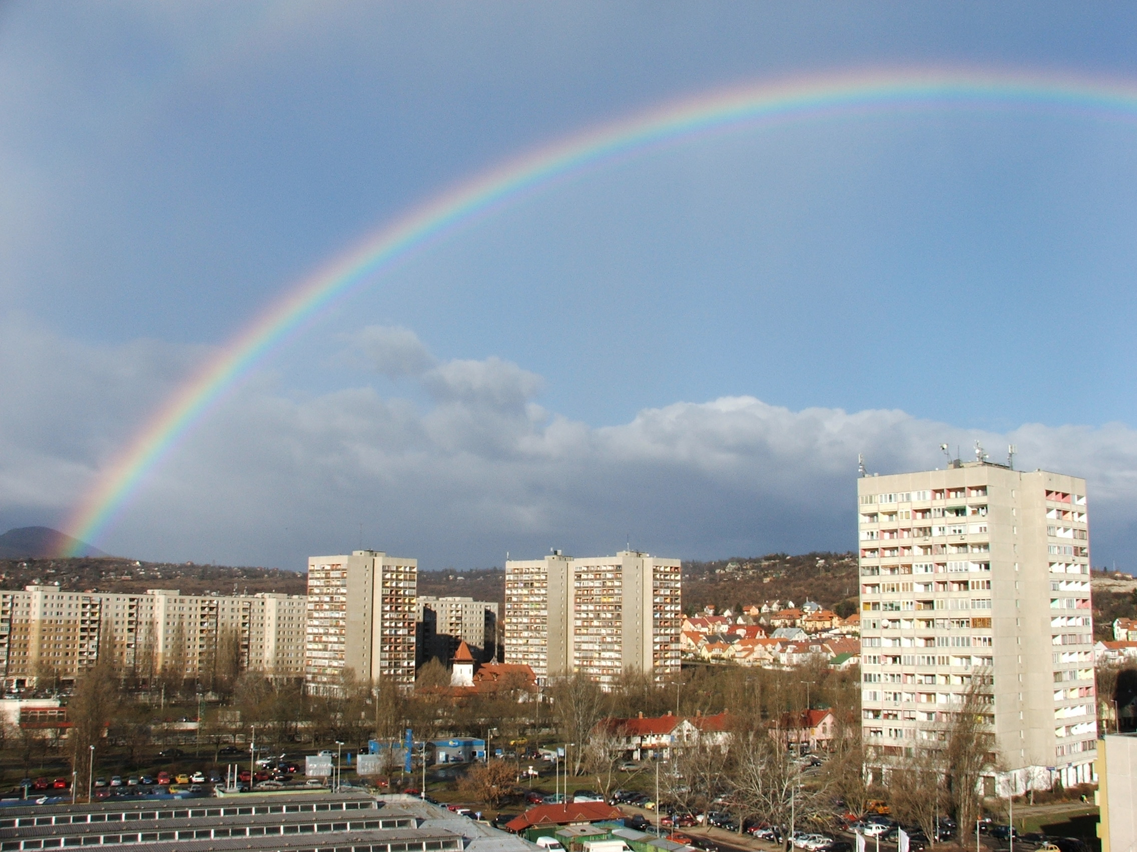 Szivárvány Békásmegyer felett